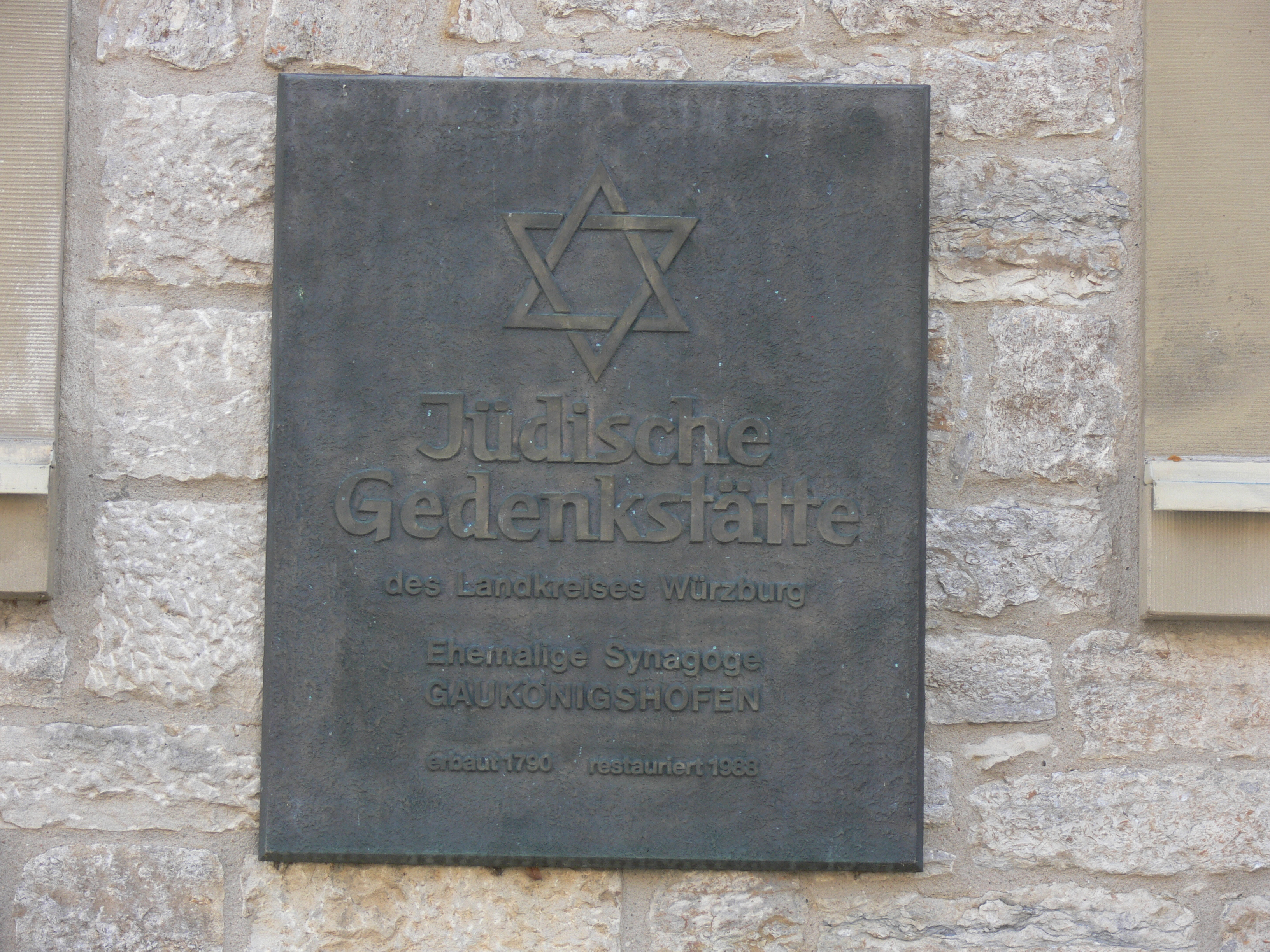 Gedenktafel an der ehemaligen Synagoge (Kreisgedenkstätte), Am Königshof 22, Gaukönigshofen, Unterfranken, Bayern, Deutschland